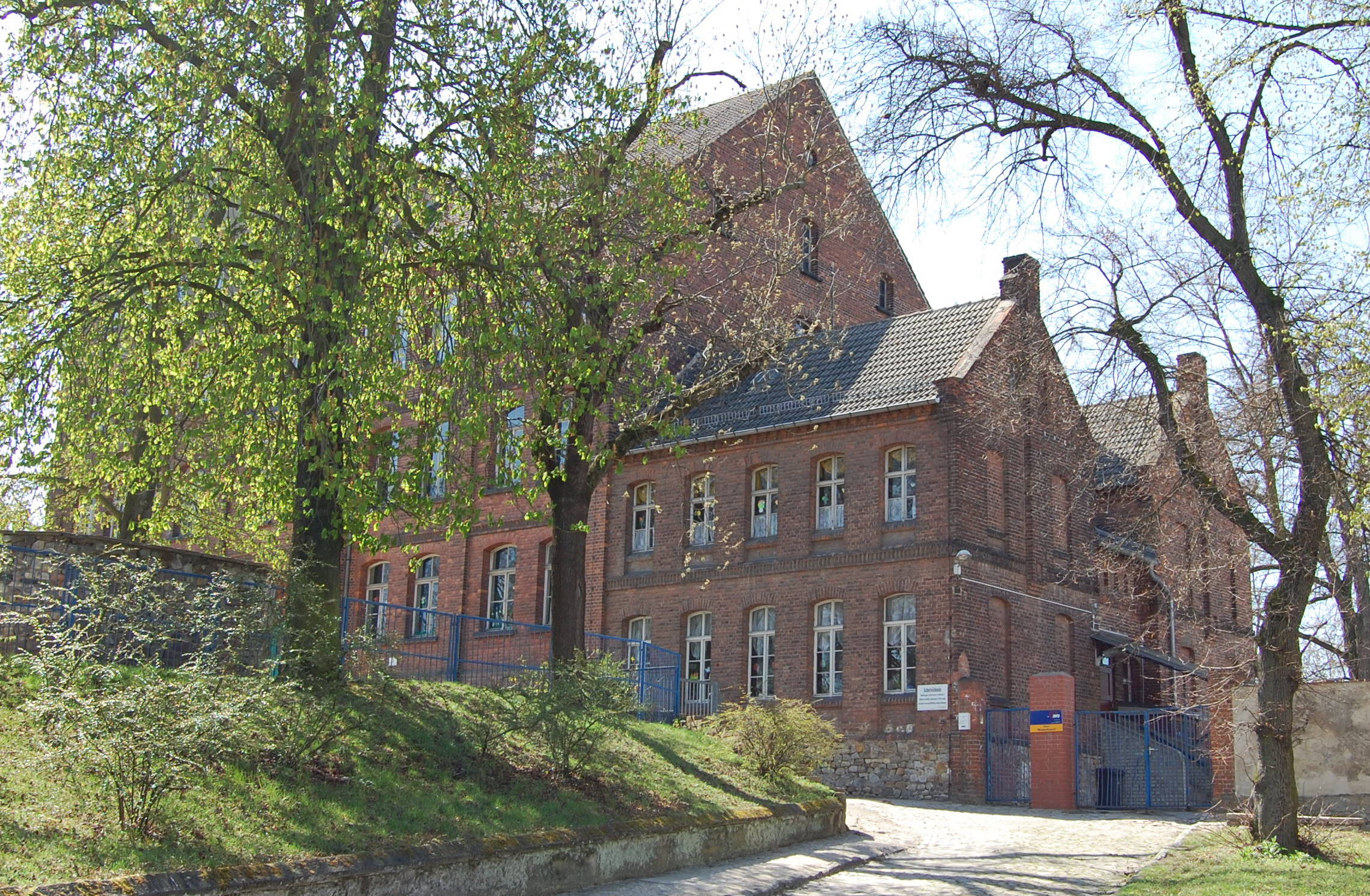 Grundschule Westerhüsen, Blick von der Zackmünder Straße